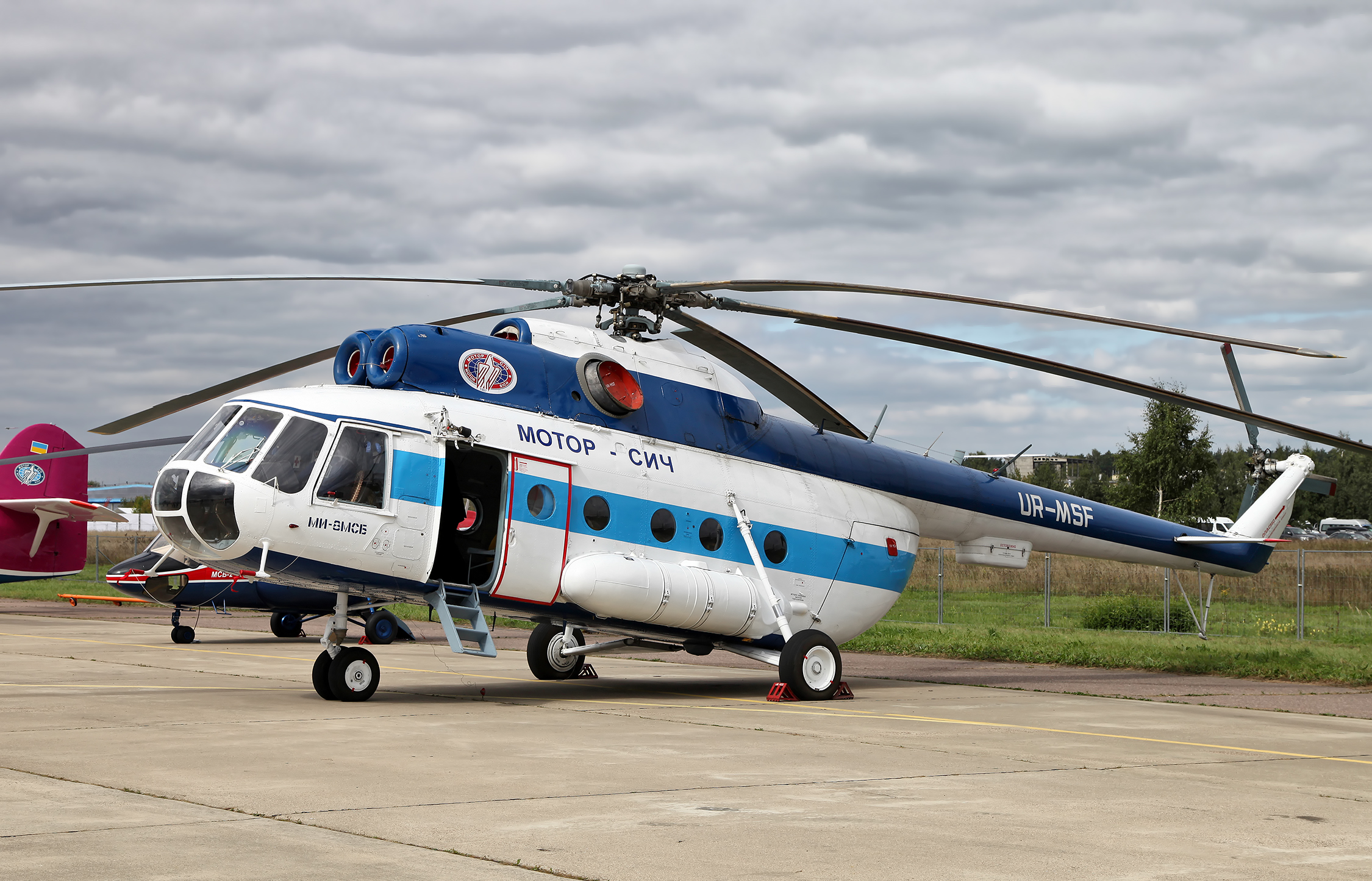 Средний транспортный вертолет Ми-8МСБ (Mi-8MSB)